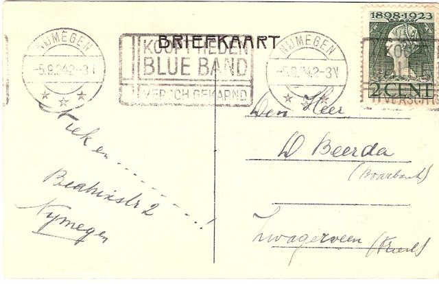 Continuerend machinestempel uit de Krag-machine in Nijmegen, met de Blue Band reclame. Datum: 5 september 1924.